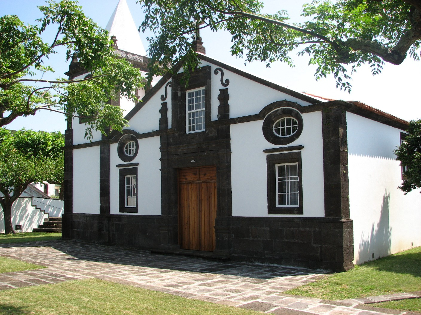 Main church of Vila do Topo (Matriz de Nossa Senhora do Rosário), São Jorge, Azores.